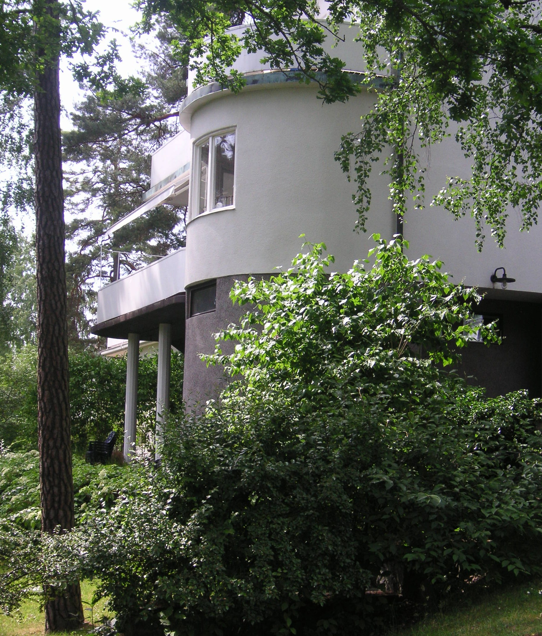 Södra Ängby, Aroseniusvägen 1 (byggnadsdetaljer), Bromma stadsdelsområde, Sverige